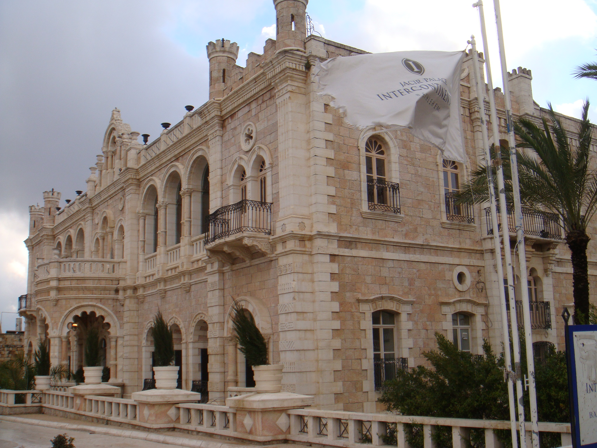 Fünfsternehotel "Intercontinental" Bethelehem, 2010